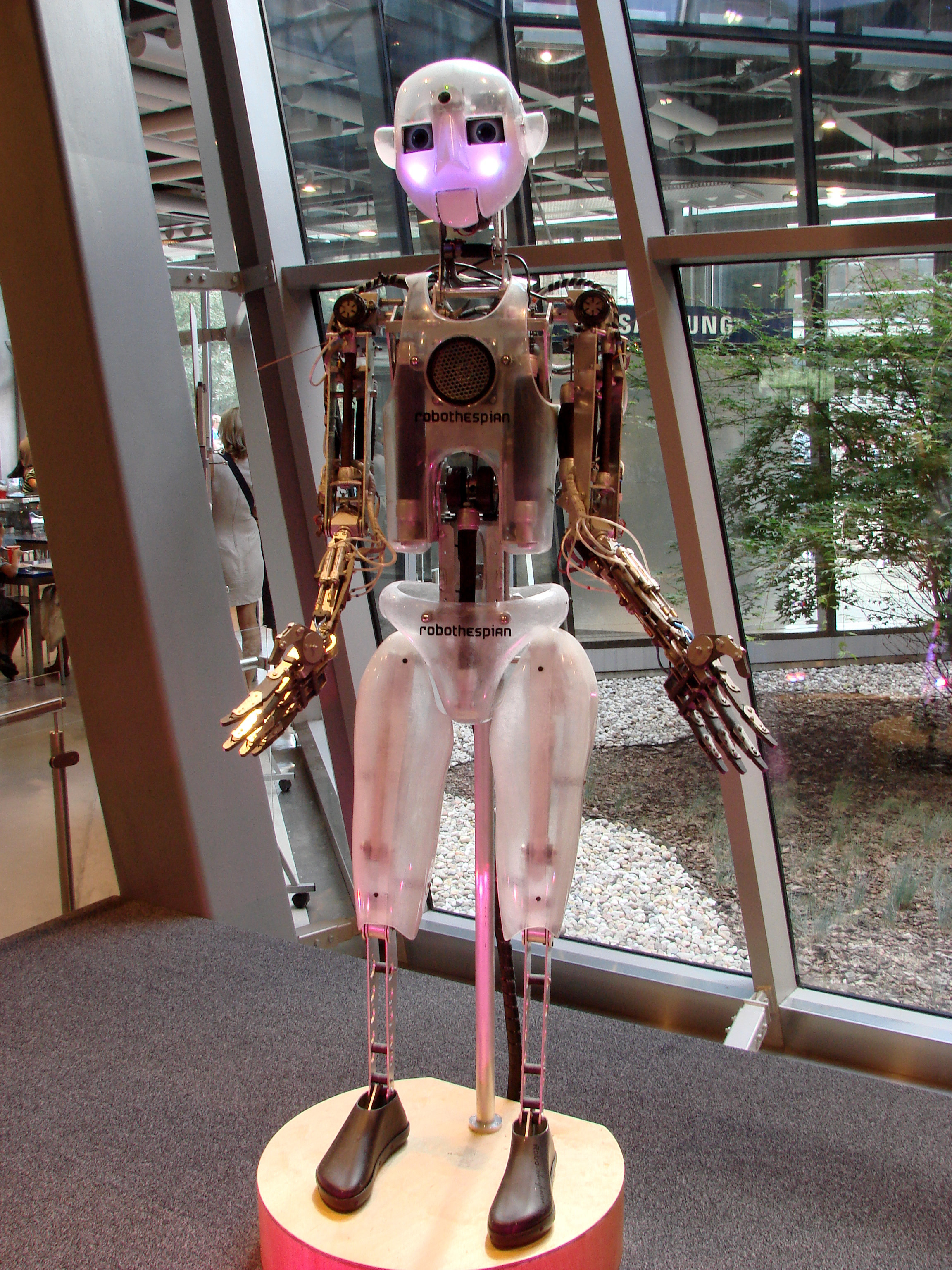 centrum nauki założone w 2005 w Warszawie. Cel - promowanie nowoczesnej komunikacji naukowej.